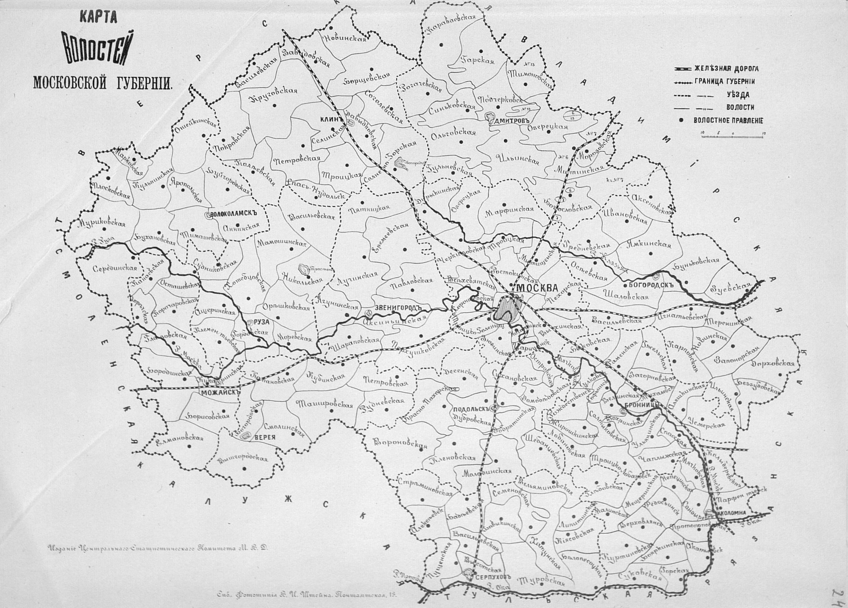 Карта волостей Московской губернии